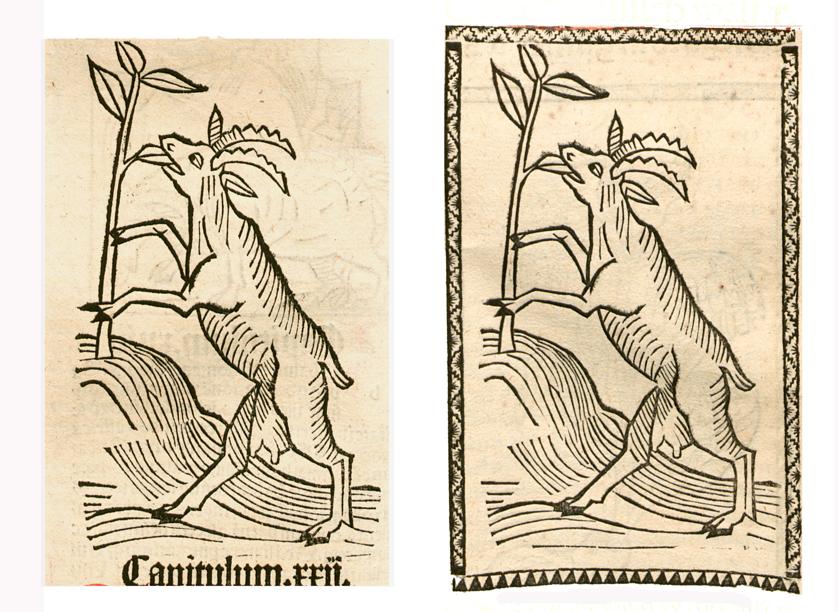 Abbildung zum Kapitel Geiß Milch (Capra)